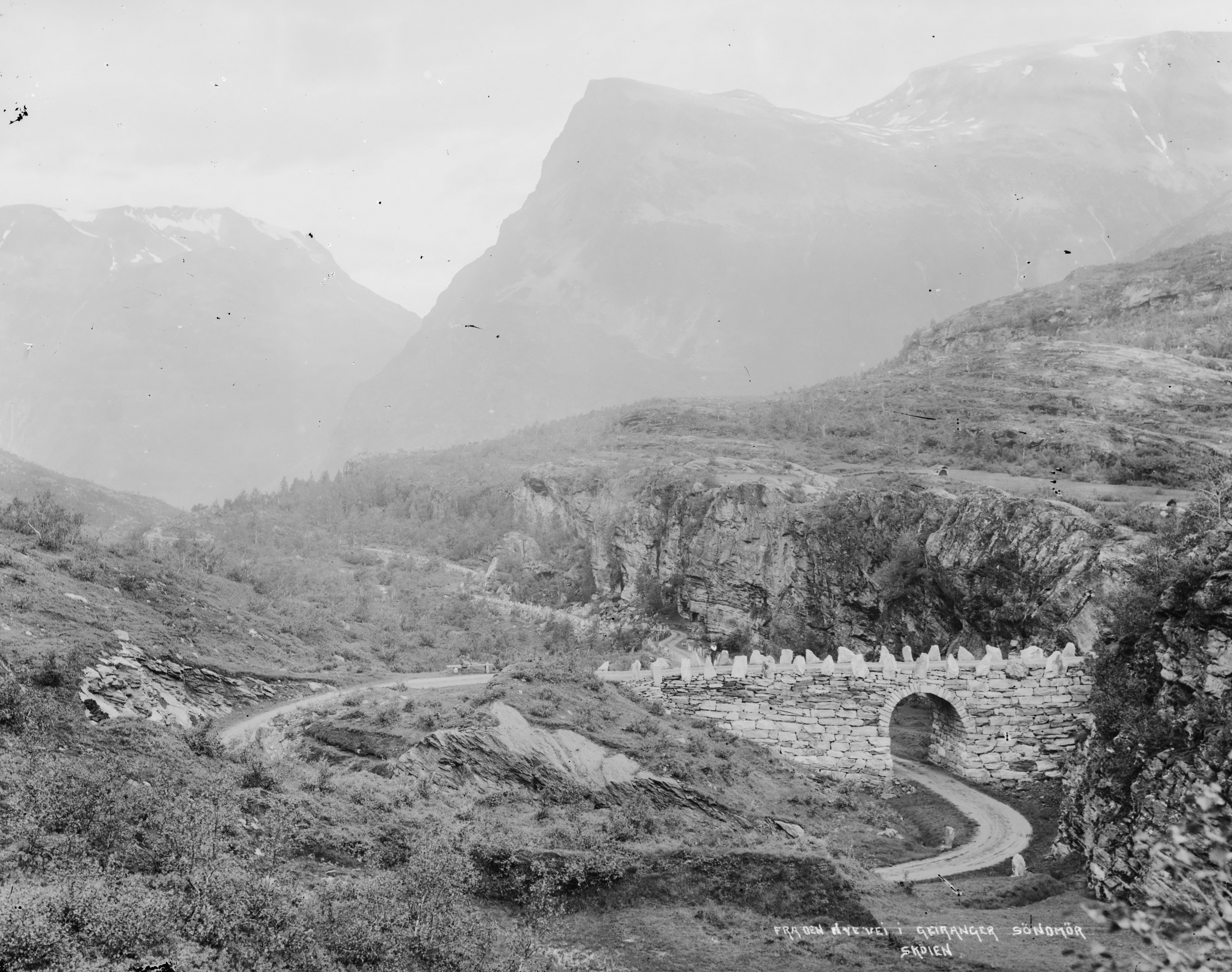 Påskrift negativ: Fra den nye vei i Geiranger Söndmör Skøien Påskrift konvolutt: Fra den nye veien i Geiranger Söndmöre [Riksantikvaren] Sted: Geiranger,Knuten,Opplendskedalen,Sunnmøre,Ørjasæter Kommune: Stranda Fylke: Møre og Romsdal Tagger: landskap fjell stabbestein vei steinbro Knuten (veibyggverk veikurve) Kommentar: Frynset kant på original er beskåret for penere visning.